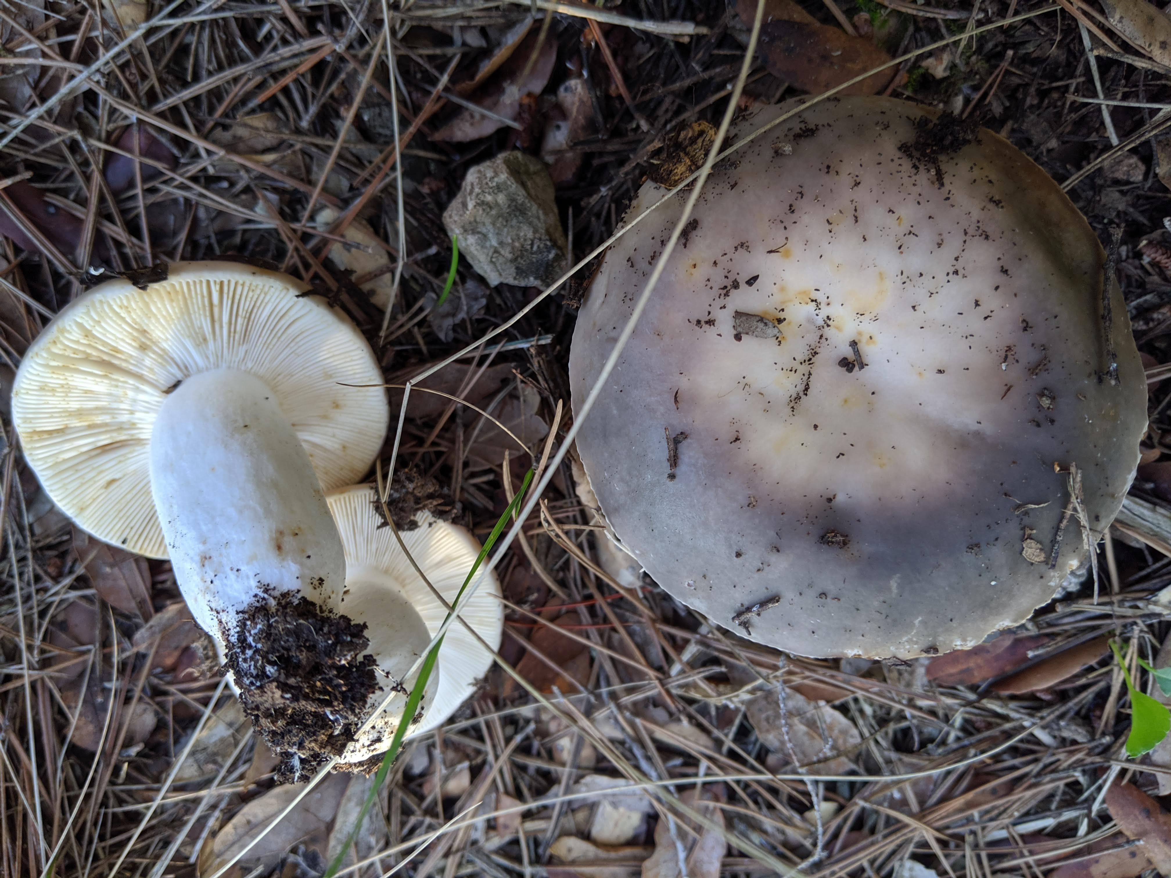 Llora blava (Russula cyanoxantha)